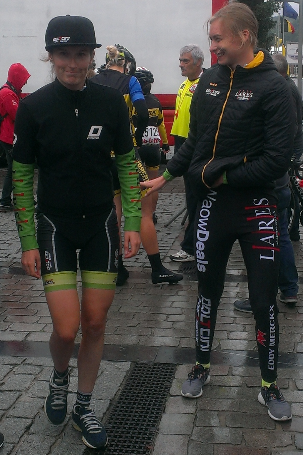 Start van de 3e en laatste etappe van de Lotto Belgium Tour 2017 in Geraardsbergen.